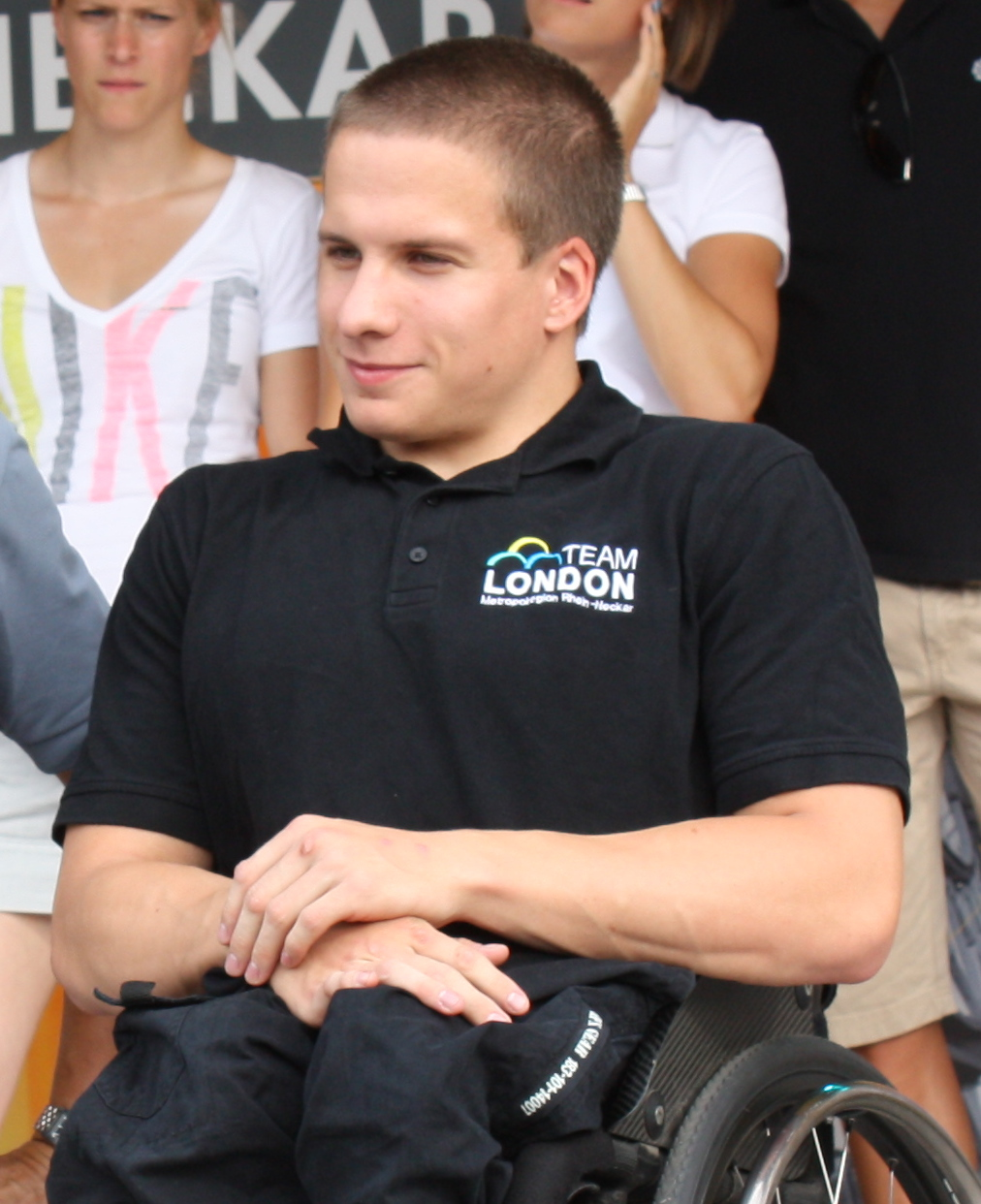 Marc Schuh beim Empfang der Olympia-Teilnehmer des Teams London der Metropolregion Rhein-Neckar 2012 in Mannheim.